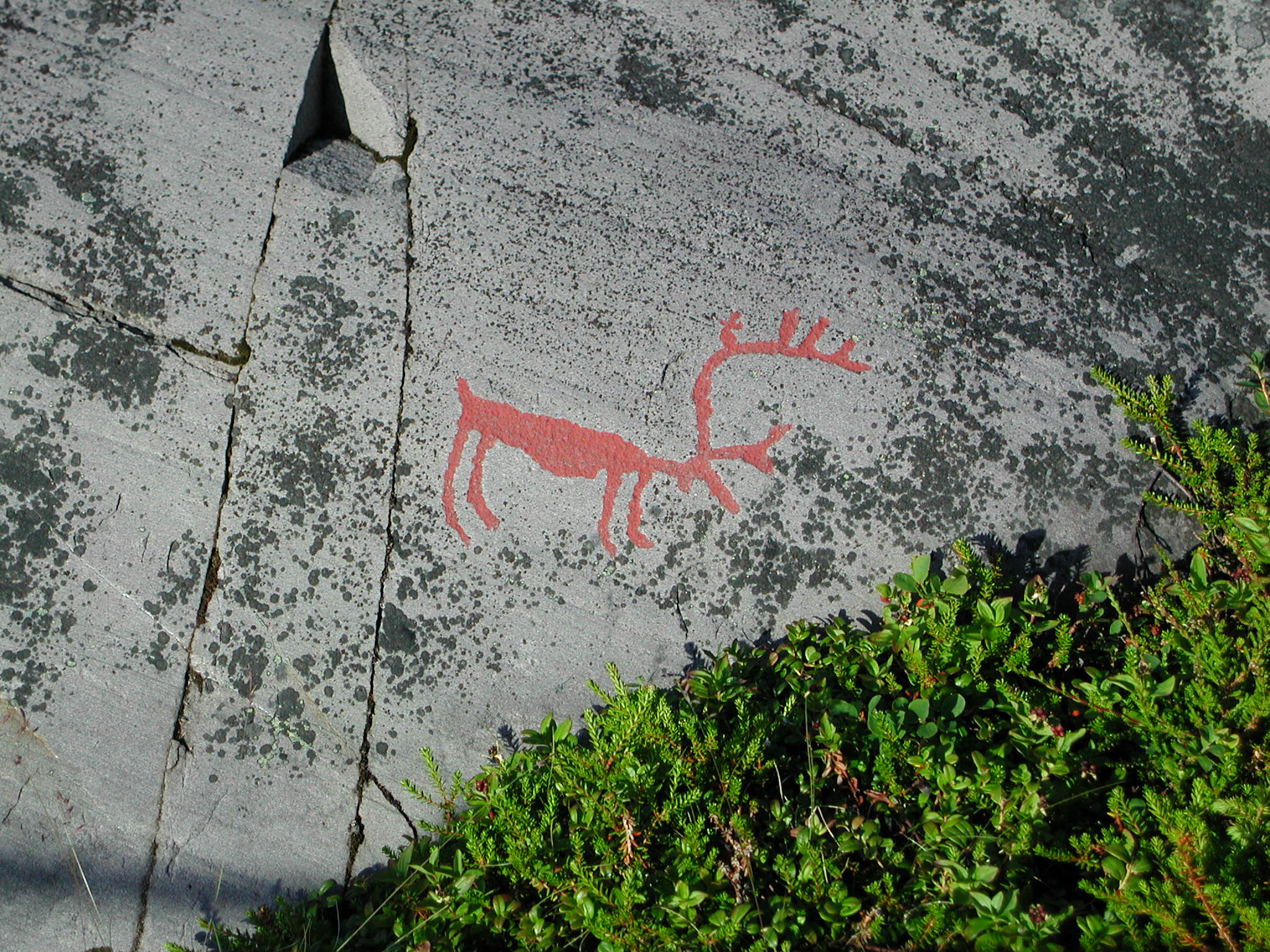 En ren bland hällristningarna i Alta.